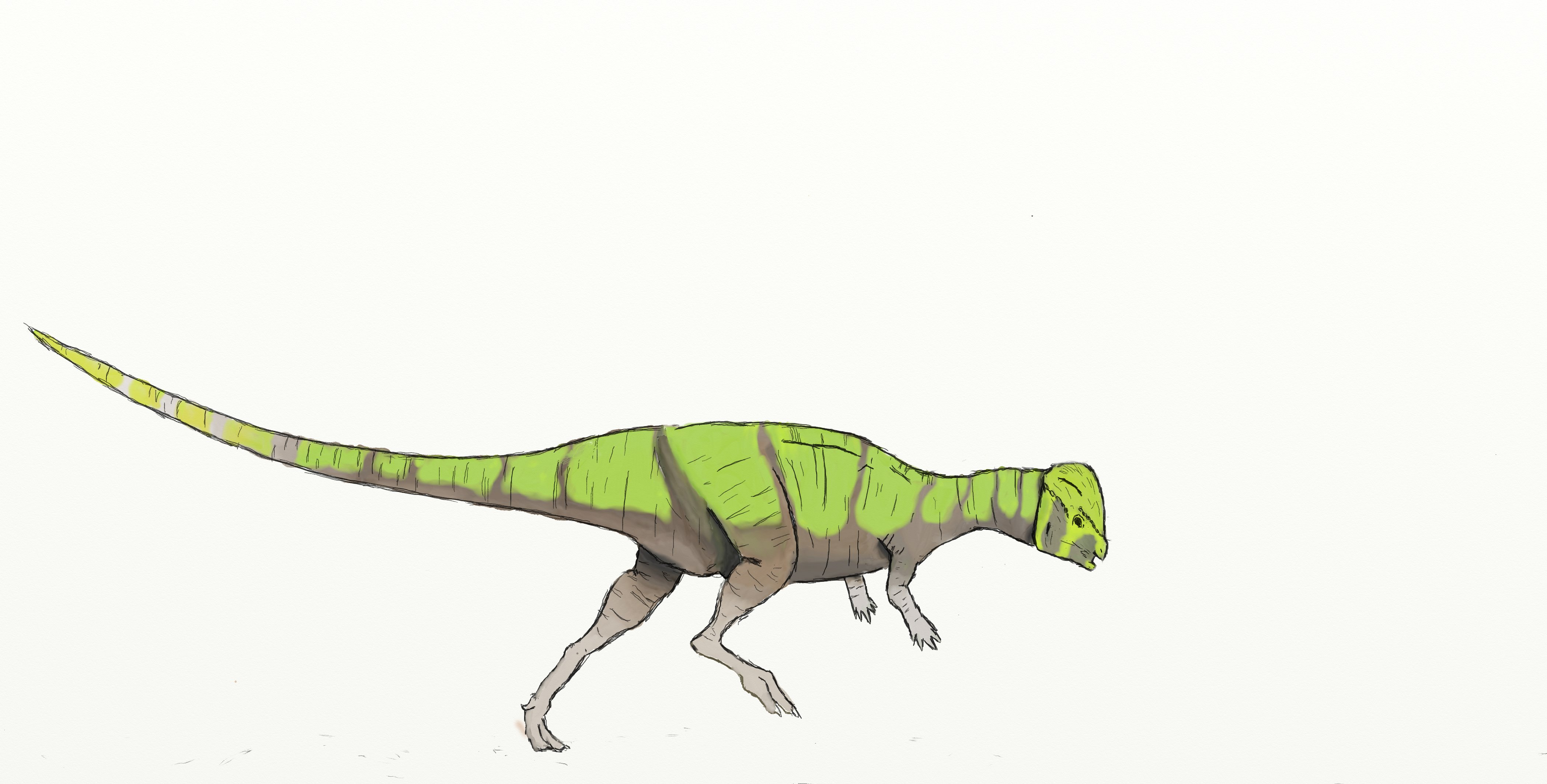 Prenocephale prenes